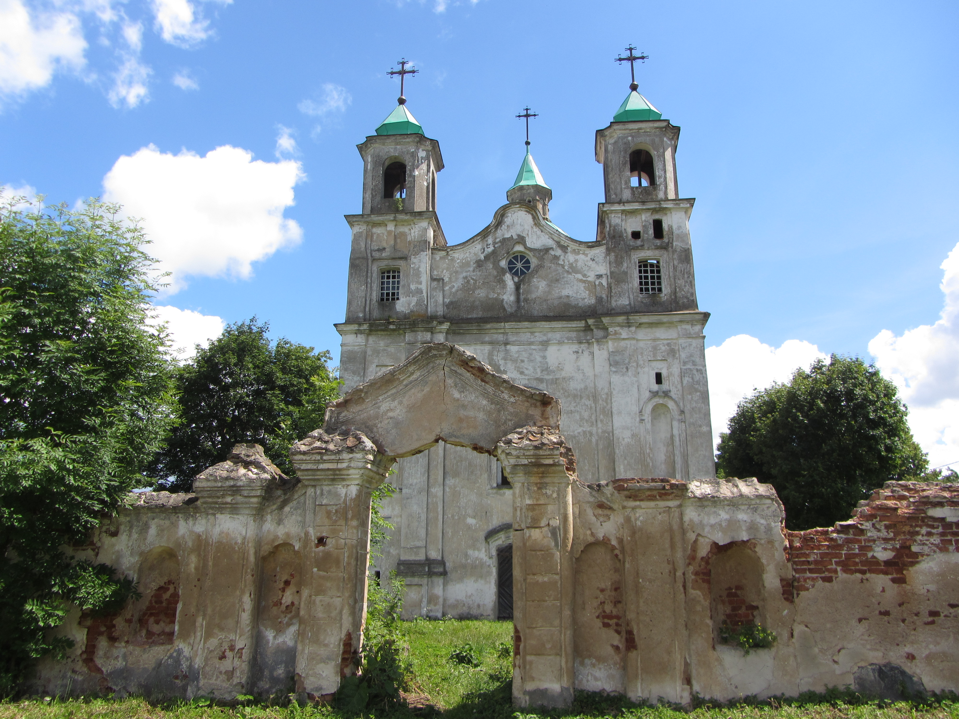 Беларуская (тарашкевіца): Касьцёл Найсьвяцейшай Тройцы, Беніца